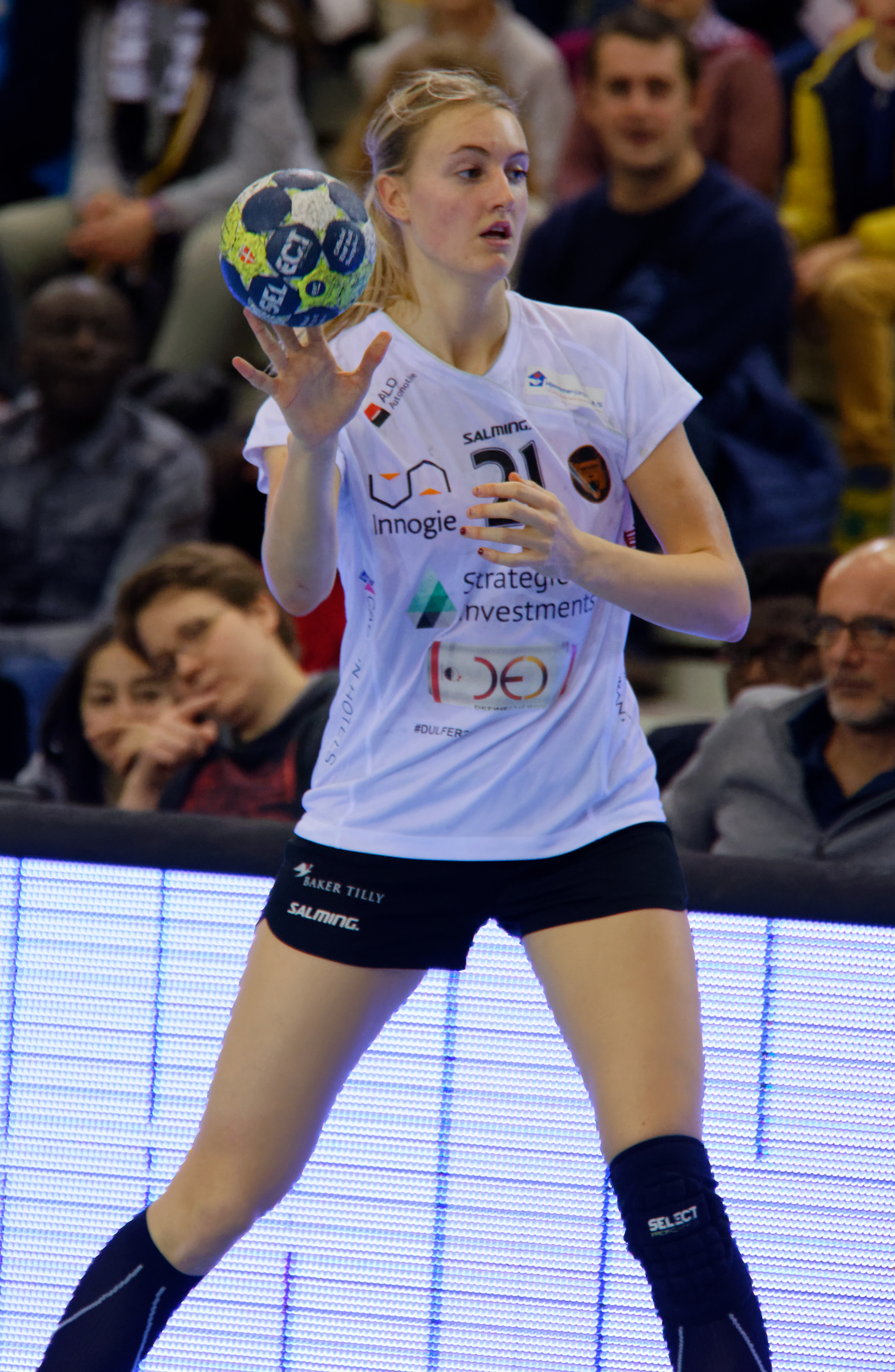 Rencontre du tour principal de la coupe EHF entre Issy Paris Hand et les danoises de Copenhague. A Issy Les Moulineaux, le 28 janvier 2018.